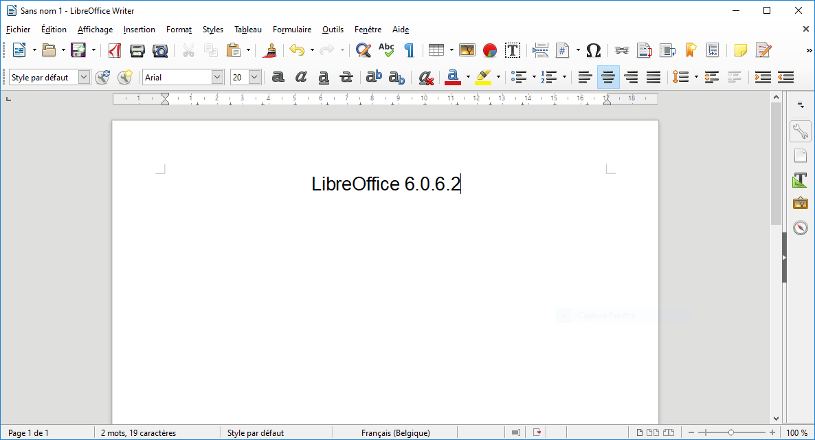 Capture d'écran de LibreOffice Writer en version 6.0.6.2 sur Windows 10